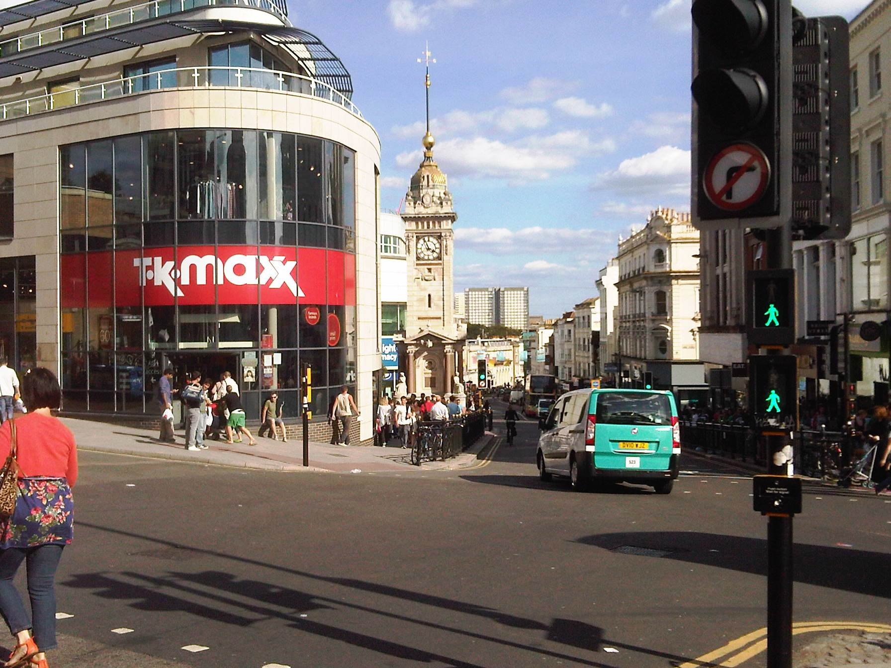 Un des principaux carrefours de Brighton avec la Clocktower, le 31 aout 2012